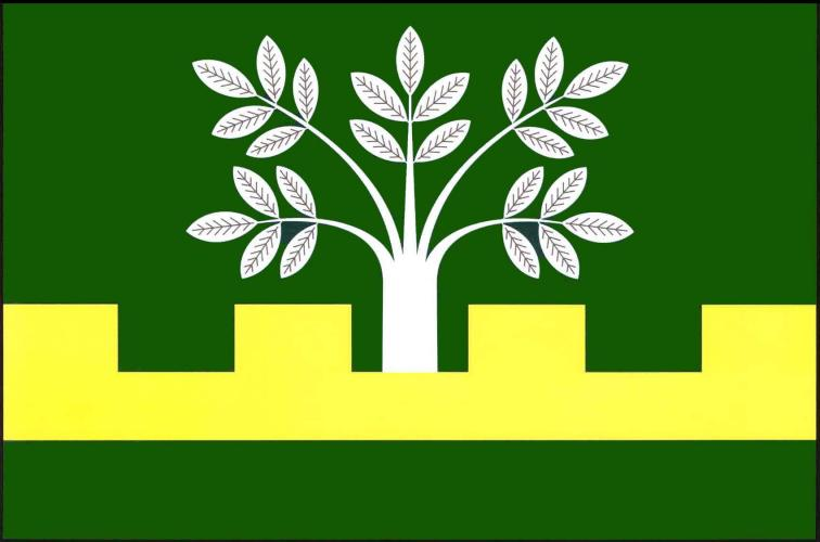 Ořechov (UH), vlajka. List tvoří tři vodorovné pruhy, zelený, zubatý žlutý a zelený, v poměru 9 : 4 : 3. Žlutý pruh má čtyři obdélníkové zuby a tři stejné mezery, z prostřední vyrůstá bílý ořešák. Poměr šířky k délce listu je 2 : 3.